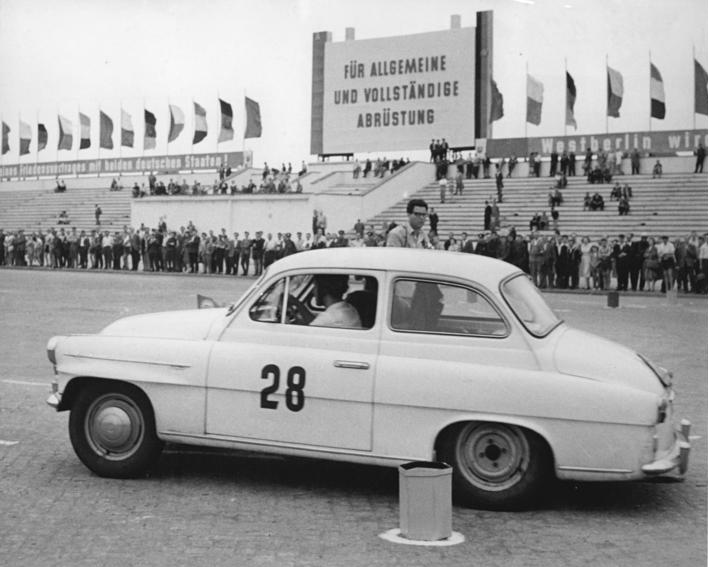 Zentralbild Zastrow-Kohls 7.6.1960 I. Internationale Automobil-Rallye Die Teilnehmer der I. Internationalen Automobil-Rallye "Für Frieden und Freundschaft" über 5000 Kilometer Moskau-Warschau-Berlin-Prag trafen am 7.6.1960 in Berlin ein. Auf dem Karl-Marx-Platz starteten sie zu einem Automobilslalom. UBz: Vor der großen Tribüne des Marx-Engels-Platzes mußte jeder Teilnehmer nach Ankunft in Berlin einen Autoslalom absolvieren."